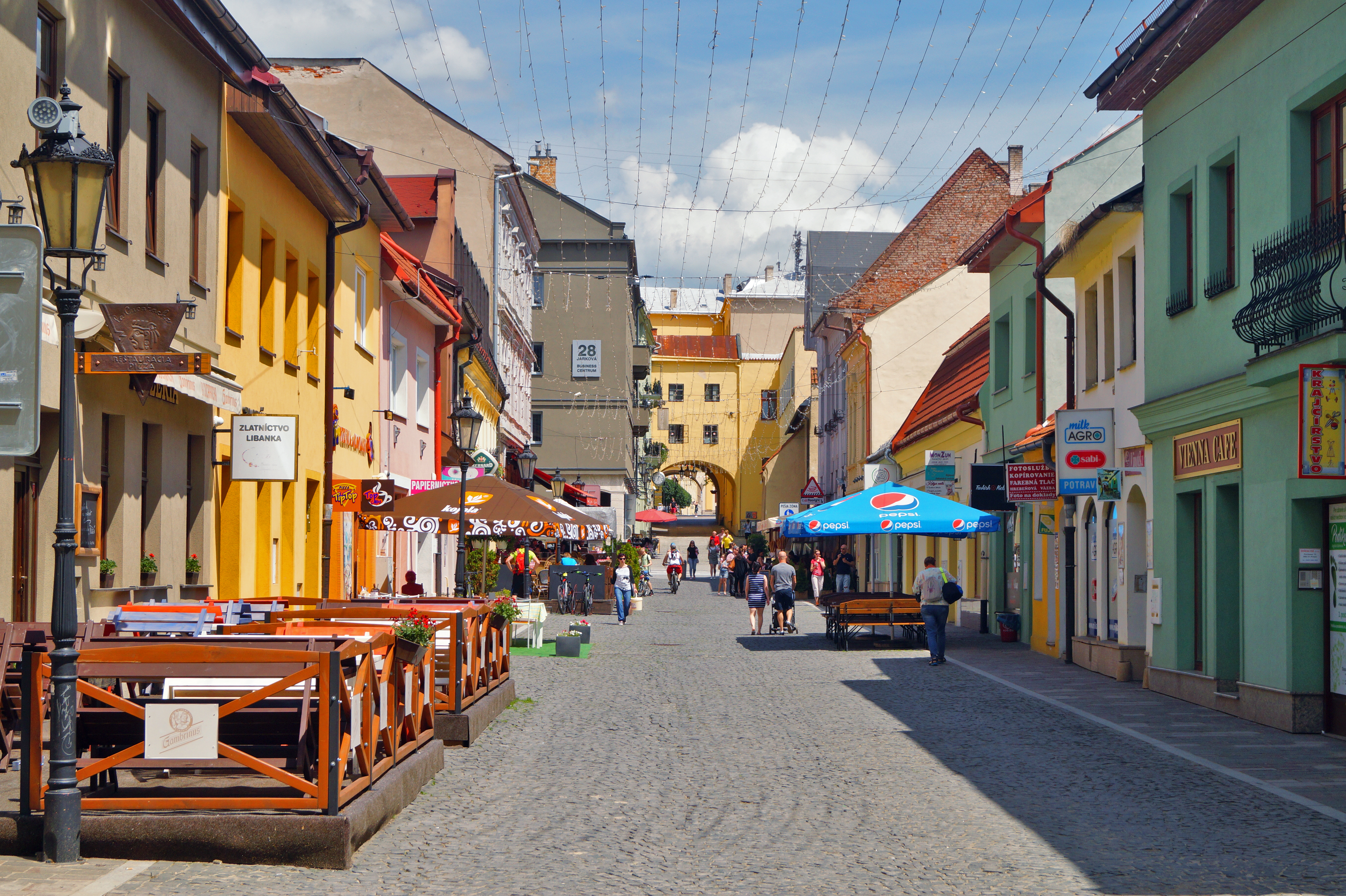 Floriánova ul., Prešov - Staré mesto